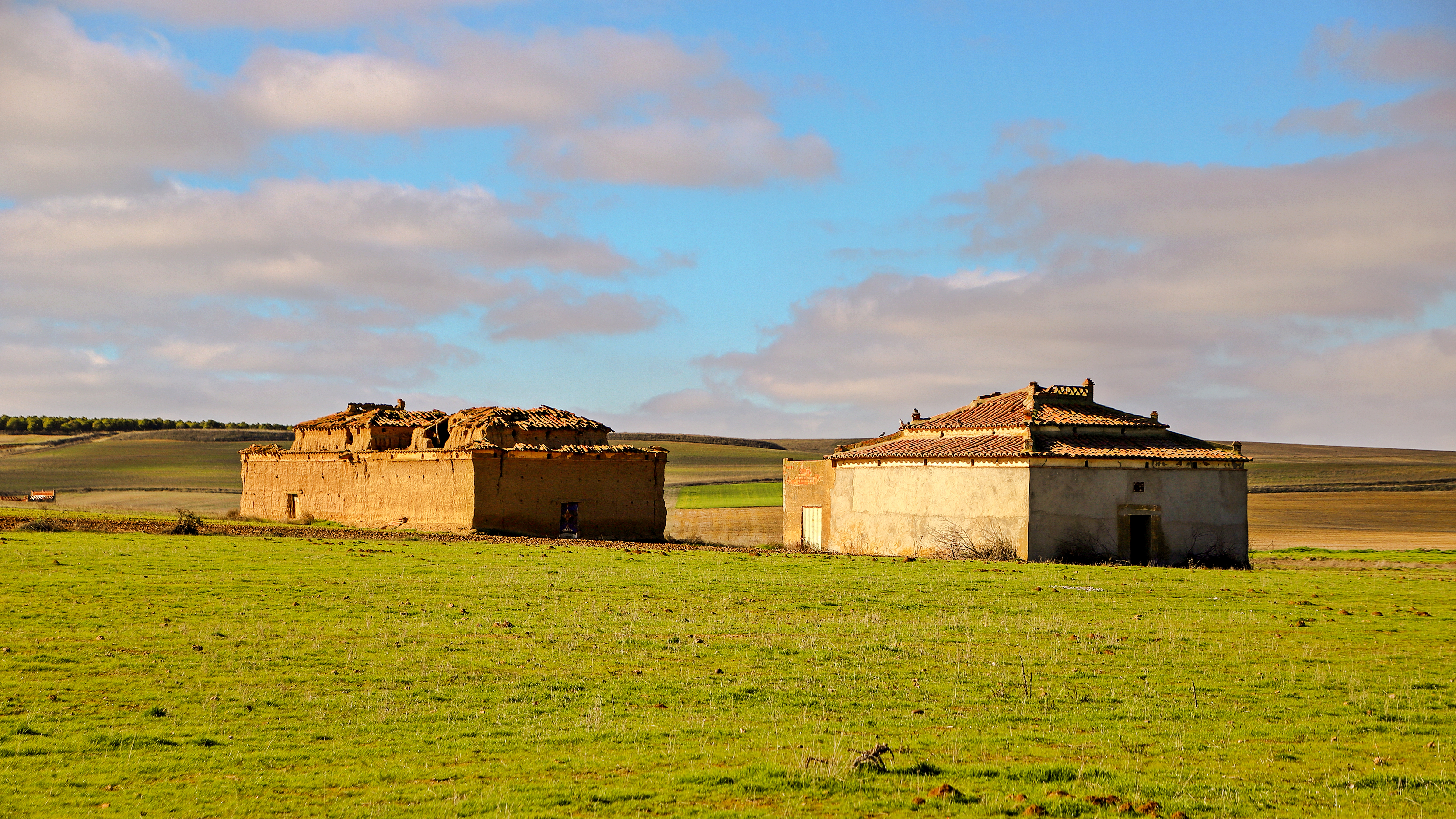 Fuentes de Ropel es un municipio de la comarca Benavente y Los Valles, provincia de Zamora.